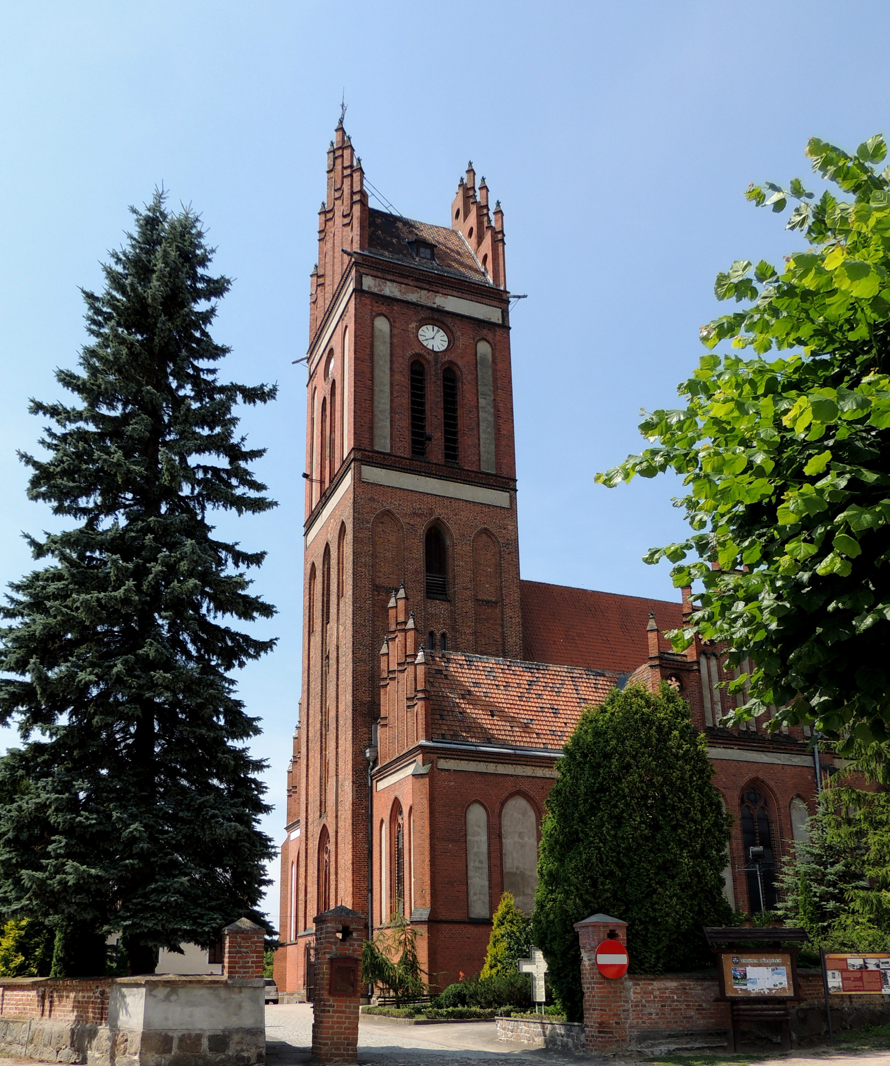 Pieniężno, Rynek 2 - rzymskokatolicki kościół parafialny pw. św. Piotra i Pawła (w granicach działki), 1 poł. XIV, 1895